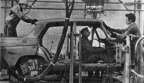 Es una foto del ensamblaje de un automóvil Siam Di Tella 1500. automóviles